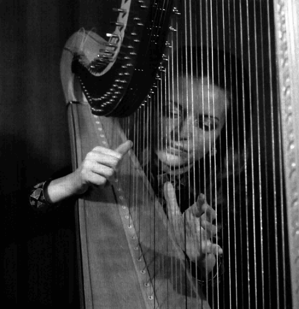 Italian harpist Elena Zaniboni